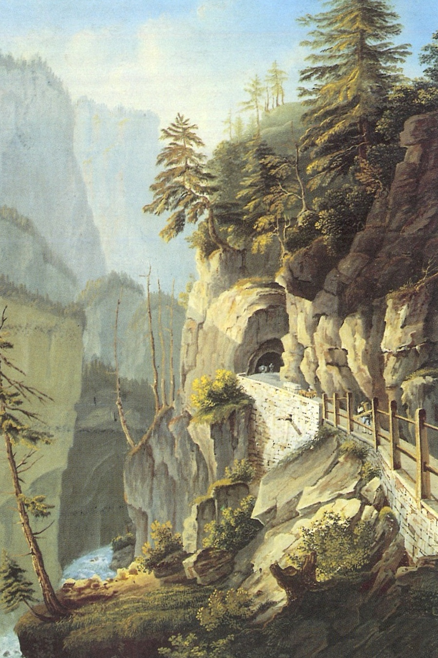 Viamala, erste Hälfte 19. Jhd.